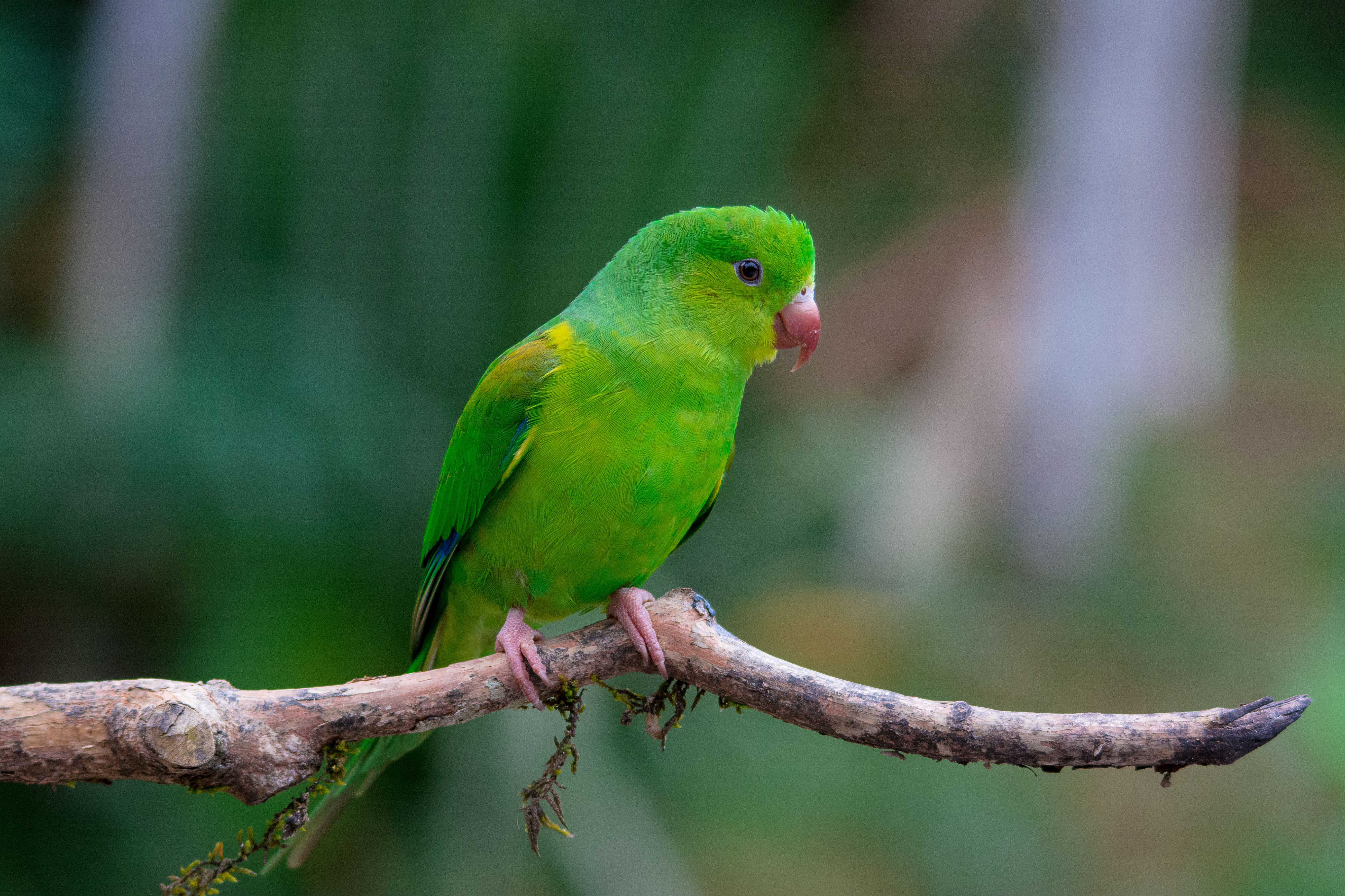 Pisitacídeo parecido com o periquito-de-encontro-amarelo. Trilha dos Tucanos Tapiraí/SP IBA: Maciço Florestal de Paranapiacaba Bioma Predominante: Mata Atlântica